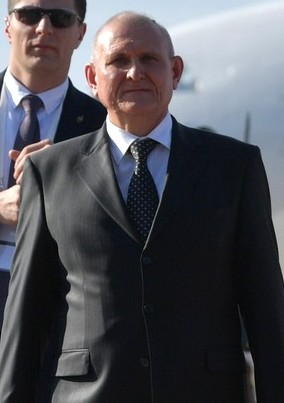 Чрезвычайный и полномочный посол Российской Федерации в Киргизии Николай Николаевич Удовиченко